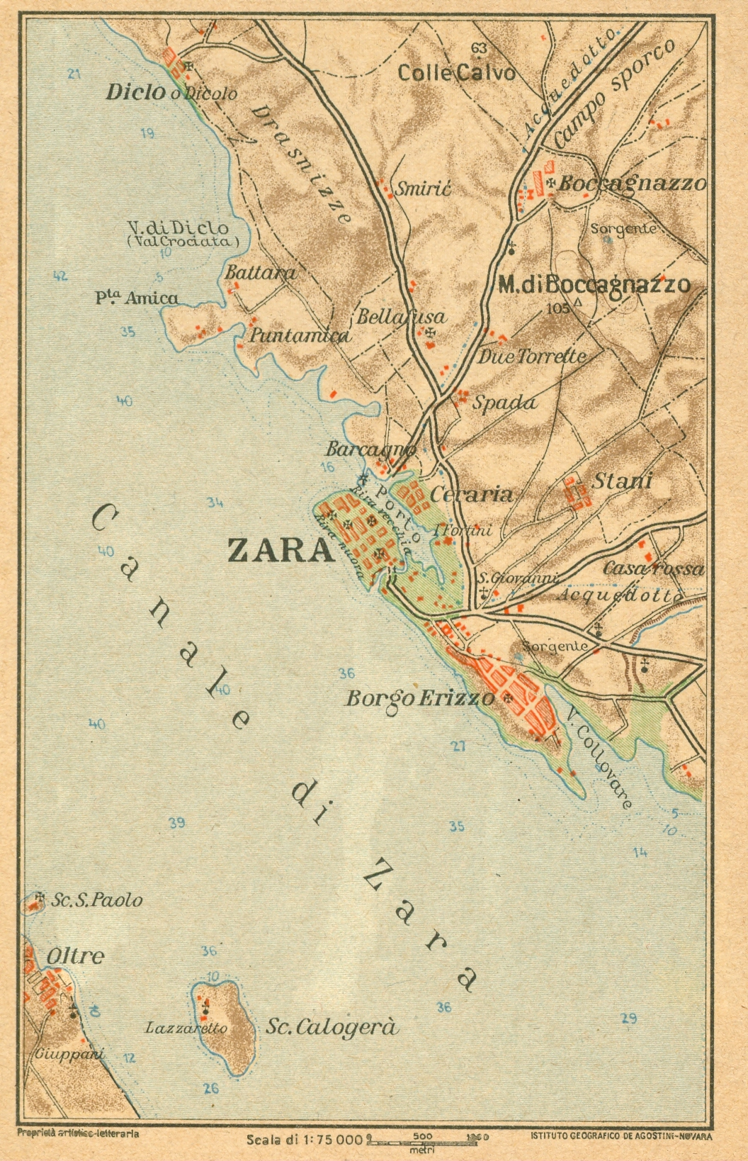 Fonte: scansione da cartolina del 1920 nella mia collezione personale